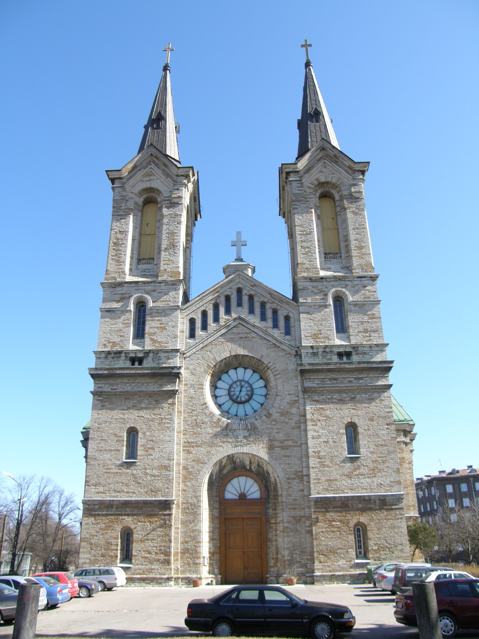 Kaarli kirik